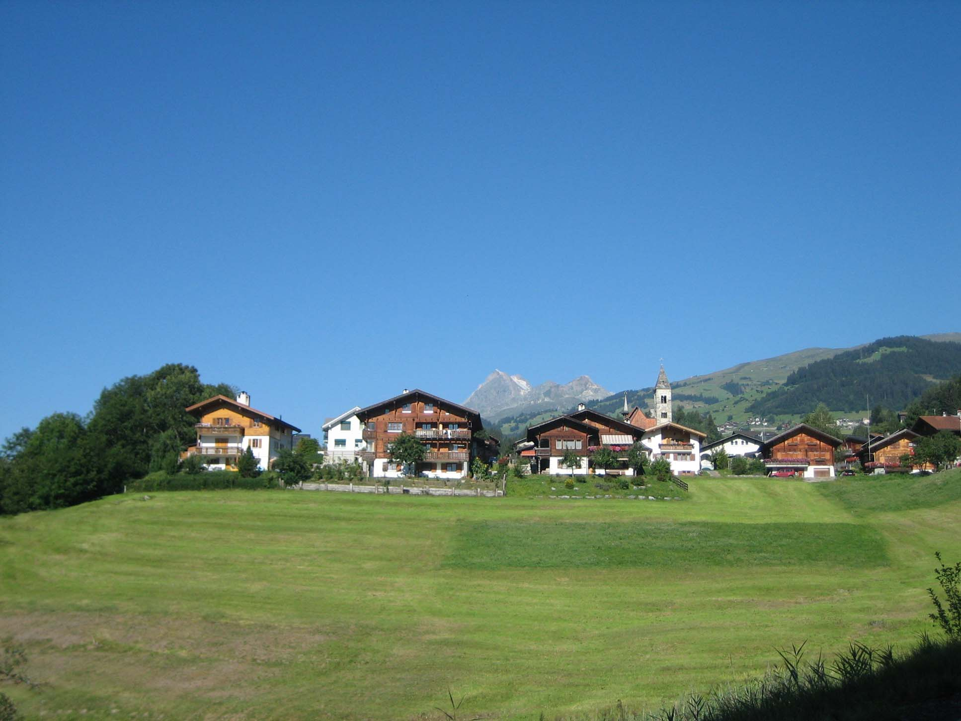 Rueun